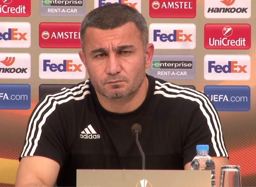 Qurban Qurbanov 2016-cı ildə